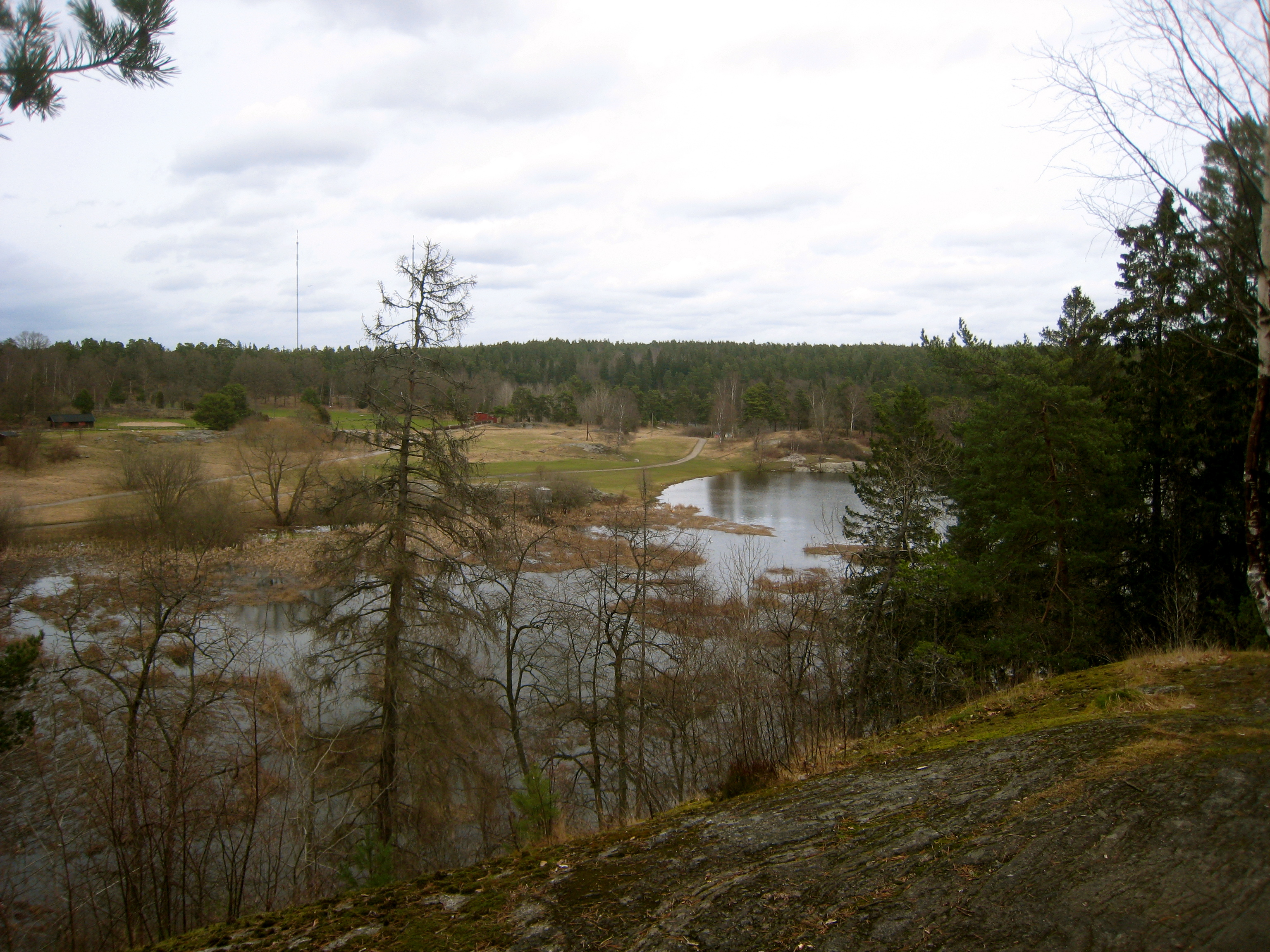 Söderbysjön